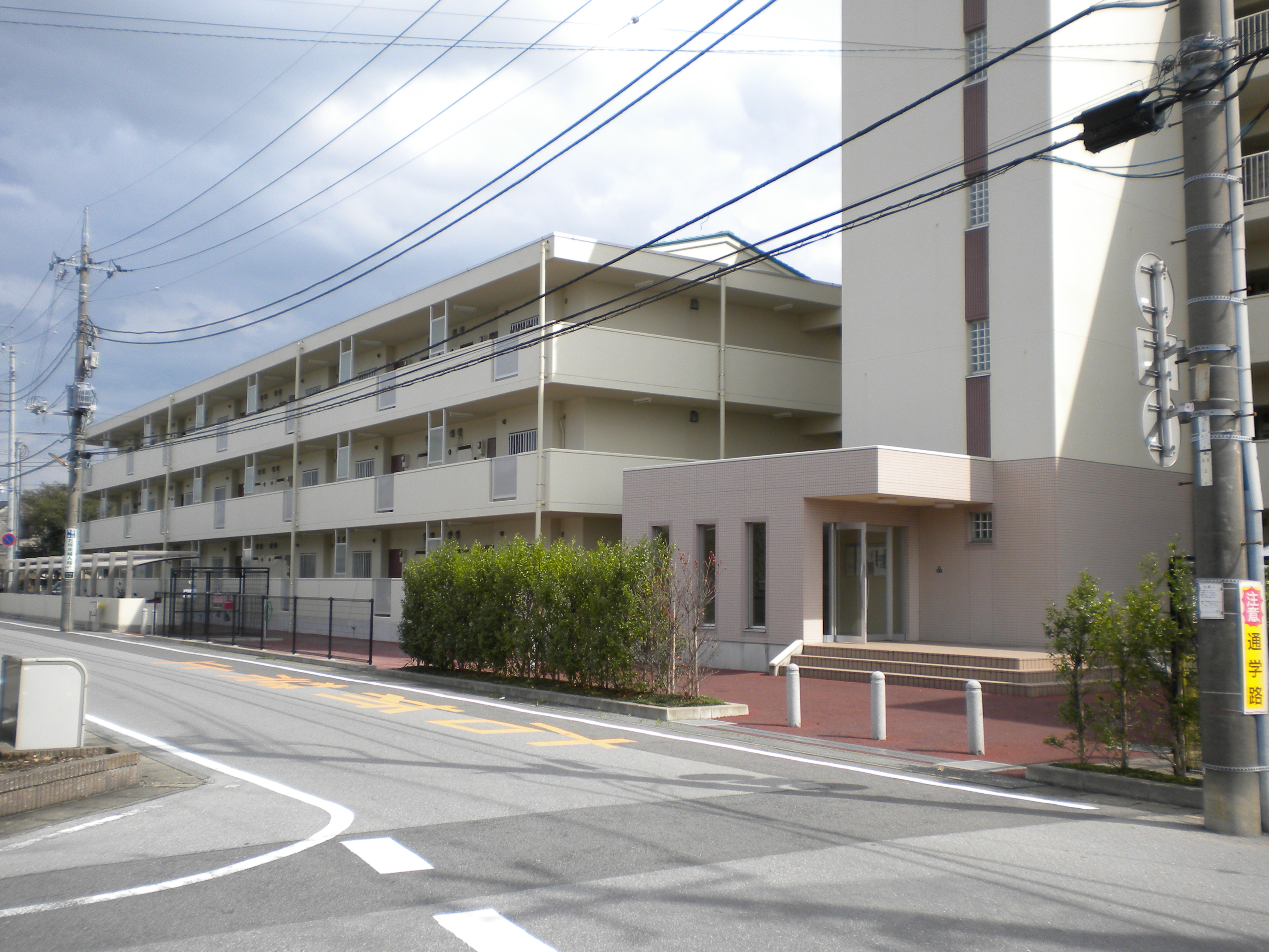 栃木県宇都宮市日の出2丁目 県営西原住宅